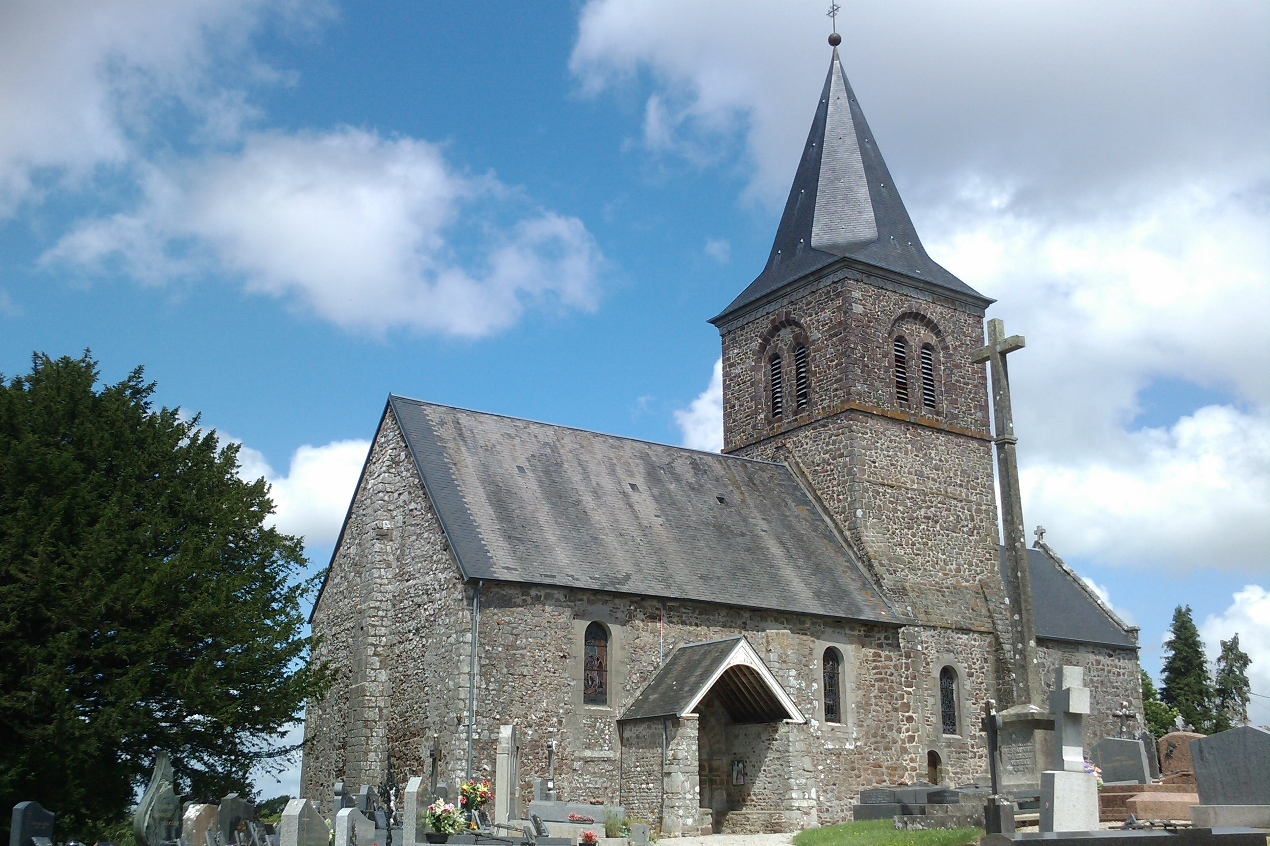 Église Saint-Pierre du Mesnil-Aubert église du XIIIe siècle, en grande partie romane avec de remarquables peintures murales .